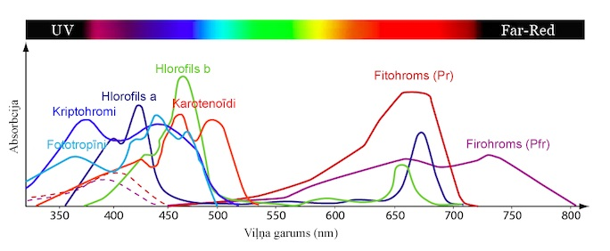 Augu fotoreceptori un to absorbcijas līksnes